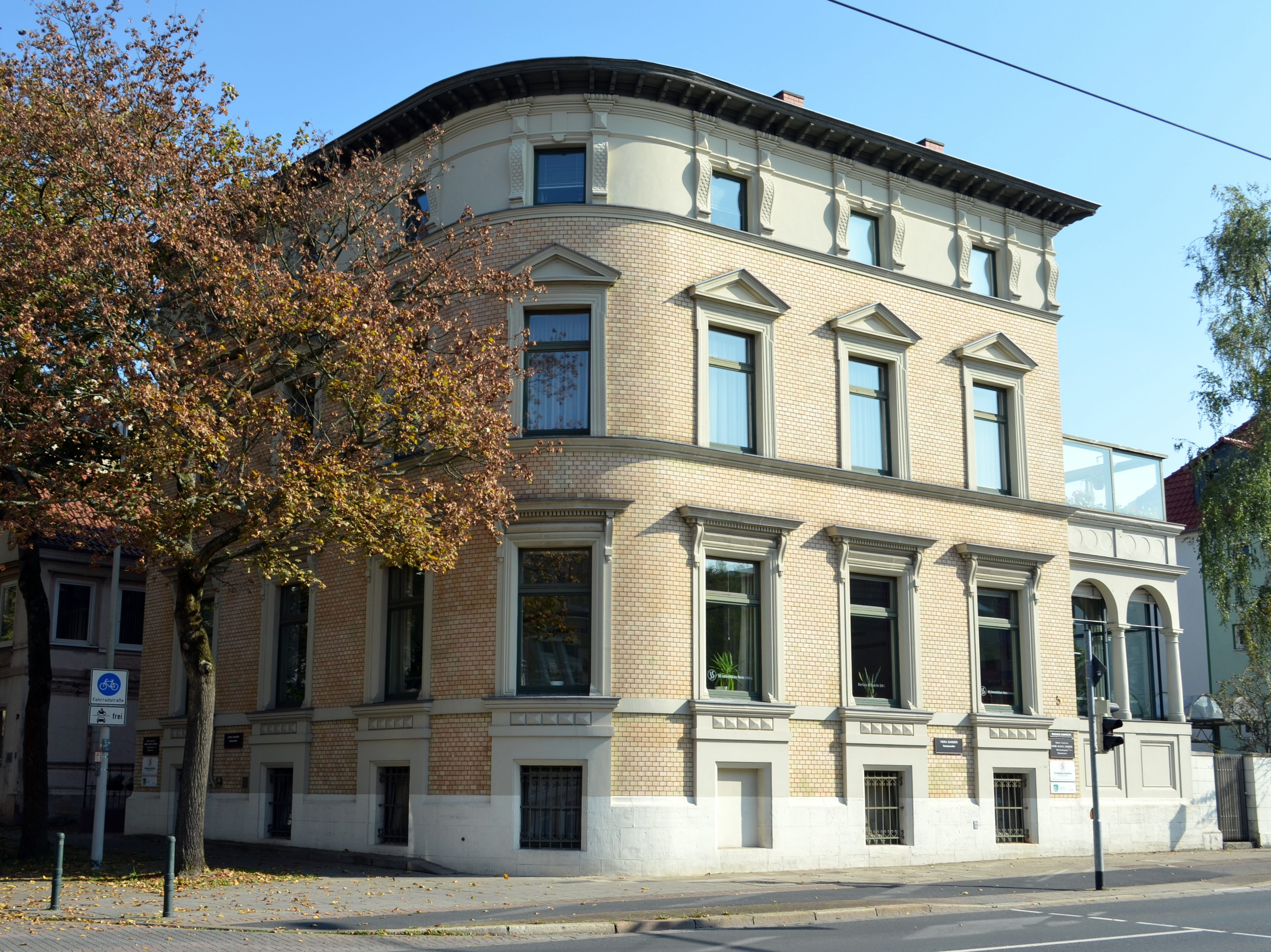 Braunschweig, Wolfenbütteler Straße 5 (früher 3): Ehemaliges Haus der jüdischen Familien Magnus (Otto Magnus und Frau Sophie, geb. Isler sowie ihrer Kinder Helene, verh. Lilien und Rudolf Magnus) und Lilien (E. M. Lilien und Frau Helene, geb. Magnus sowie ihrer Kinder Otto und Hannah).